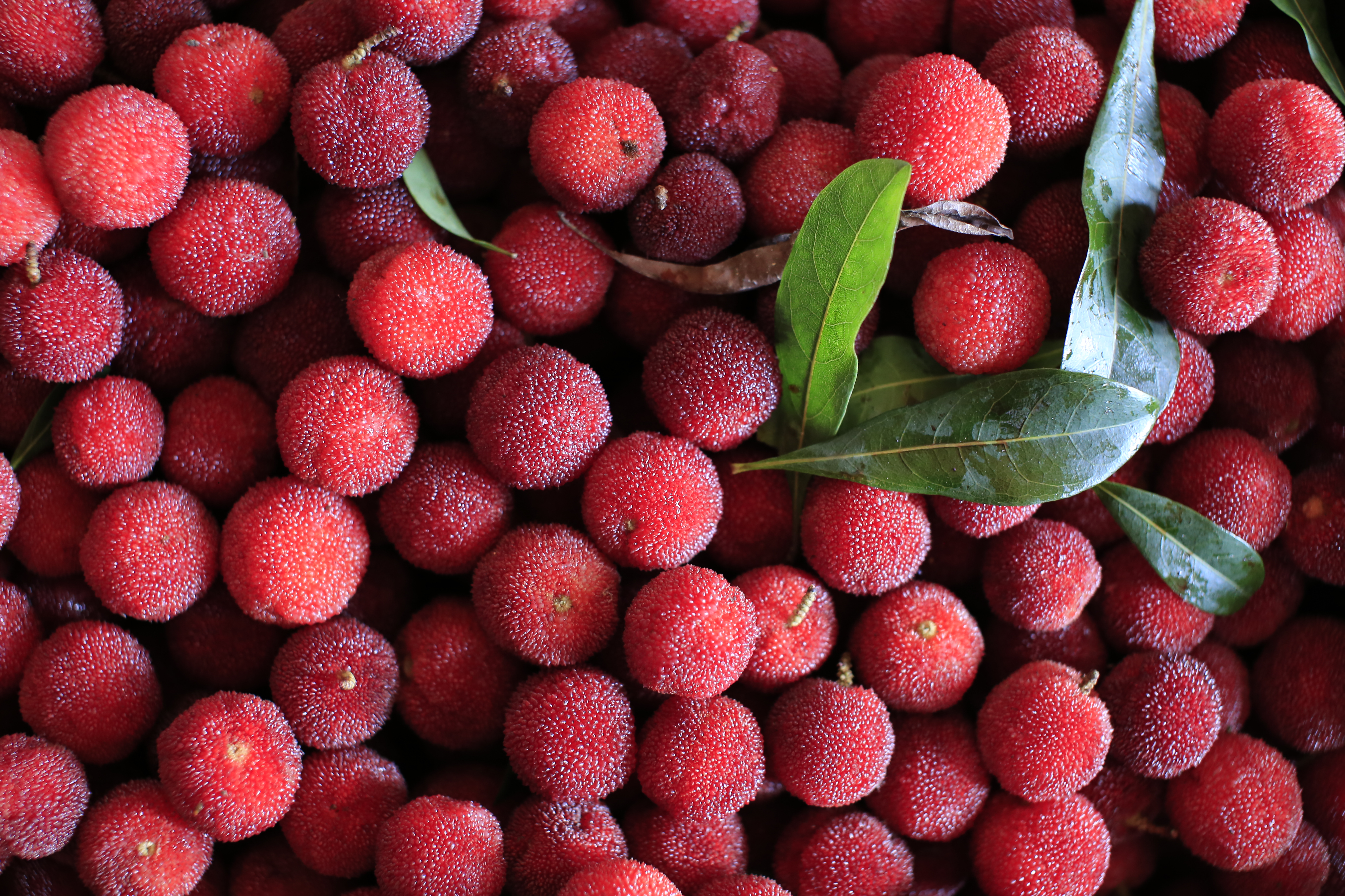 杨梅，产于江西省乐平市历居山